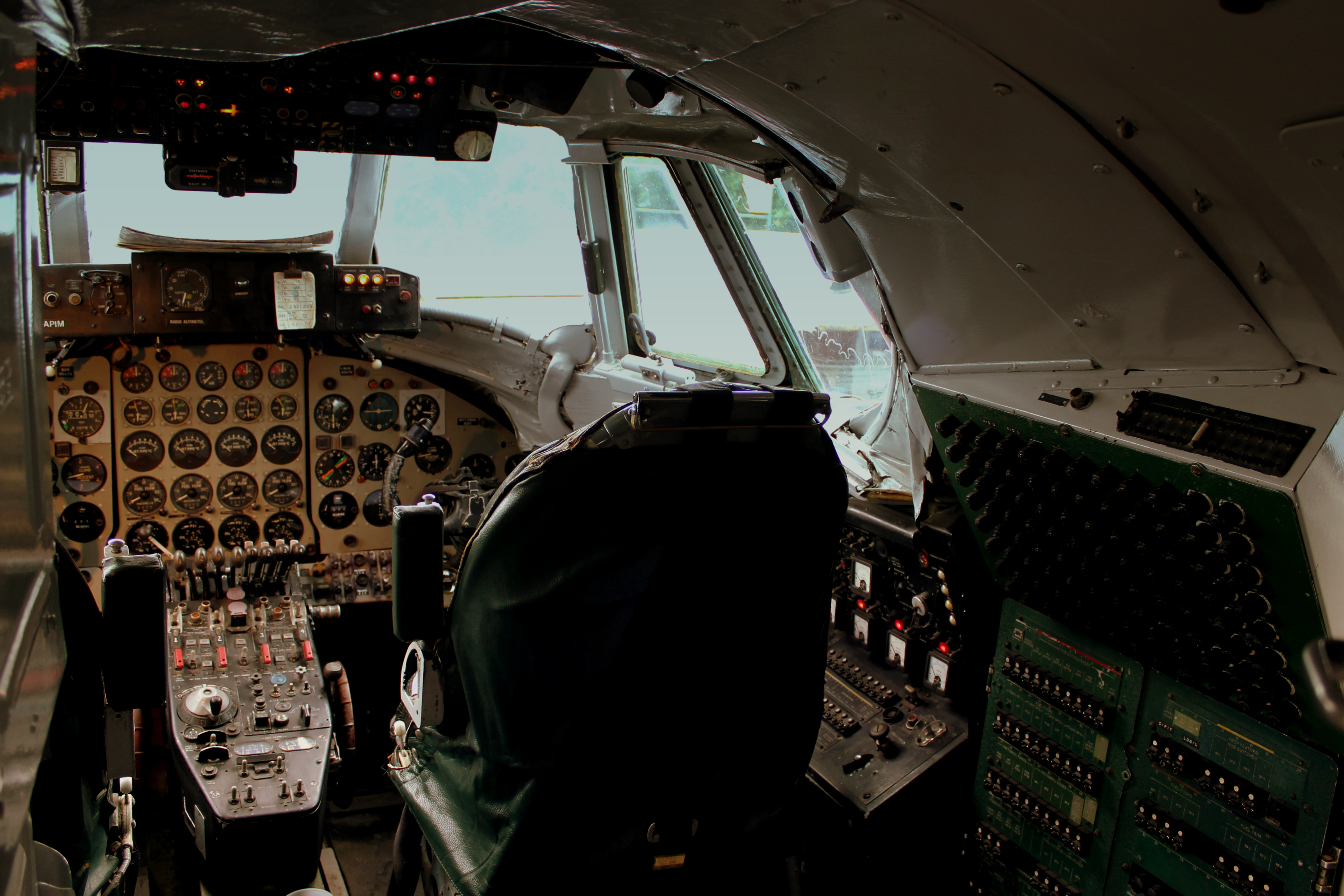 BRITISH AIR FERRIES VICKERS VISCOUNT 806 G-APIM VISCOUNT STEPHEN PIERCEY COCKPIT VIEW AT THE BROOKLANDS MUSEUM WEYBRIDGE SURREY JUNE 2014